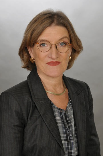 Christina von Braun (Foto: Dagmar Stratenschulte, Berlin)